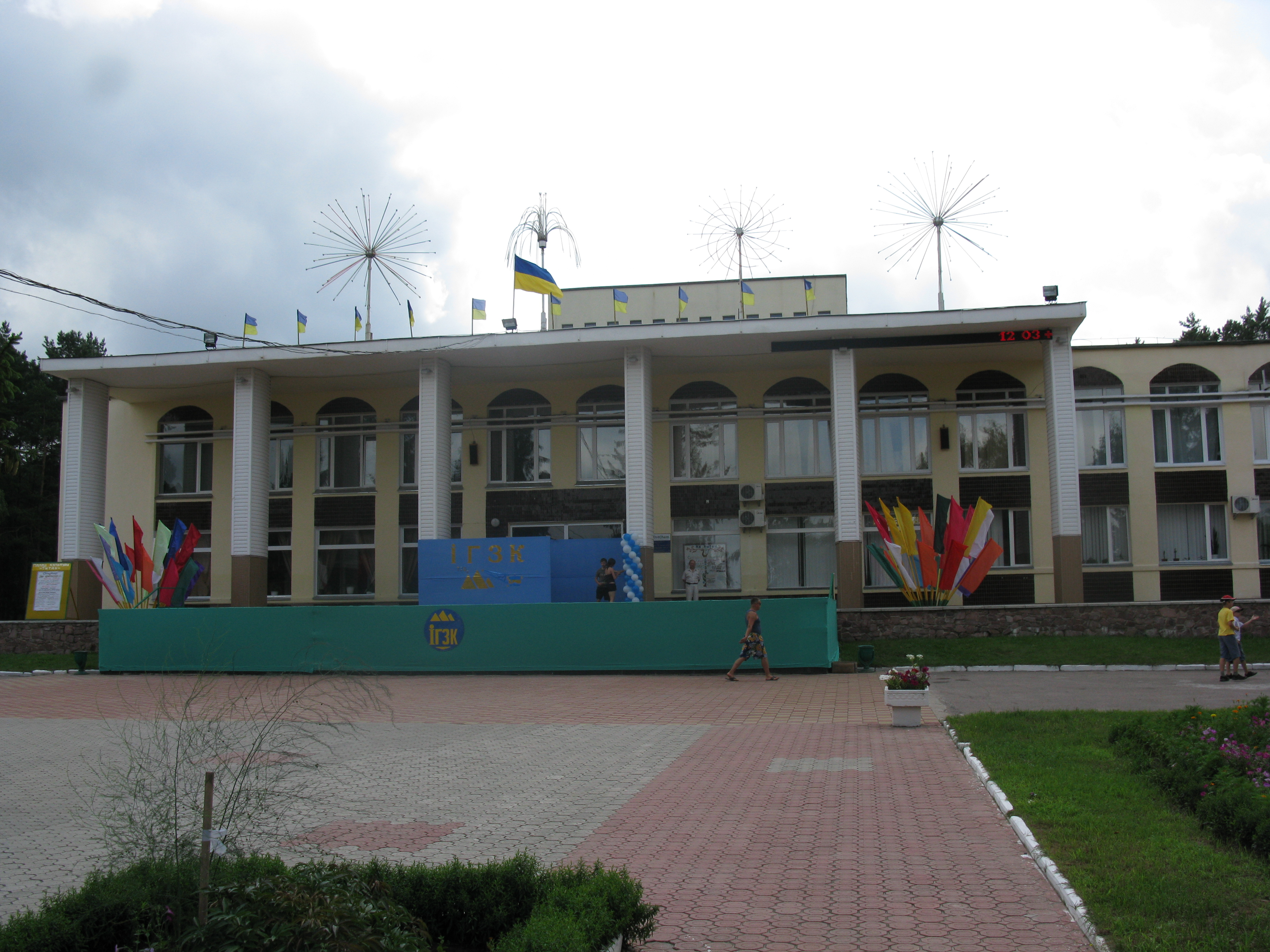 Іршанськ, Палац культури "Титан", липень 2011